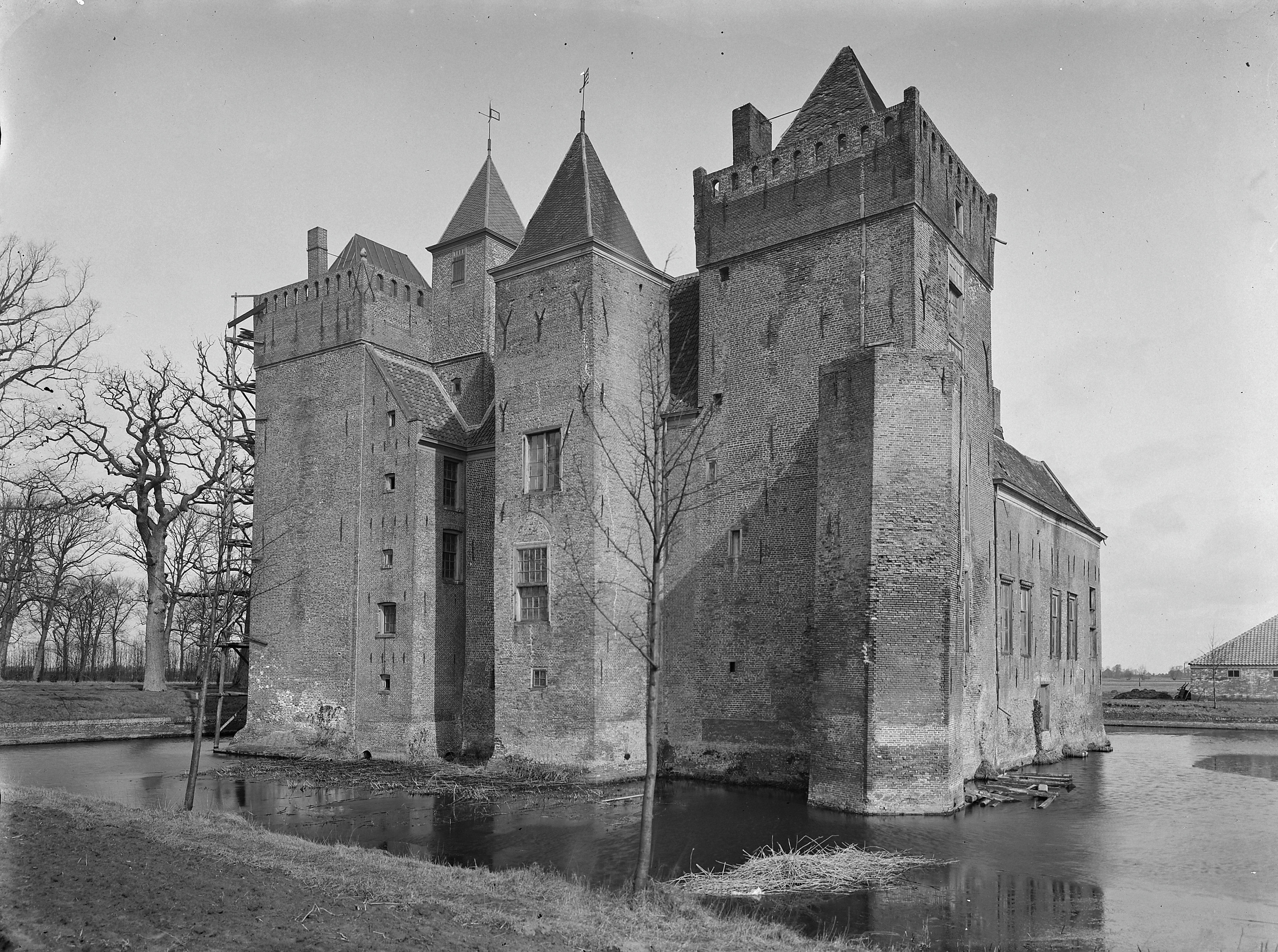 Kasteel Assumburg: Overzicht met slotgracht (opmerking: In: Buiten ; 11(1917), nr. 24, p. 285)